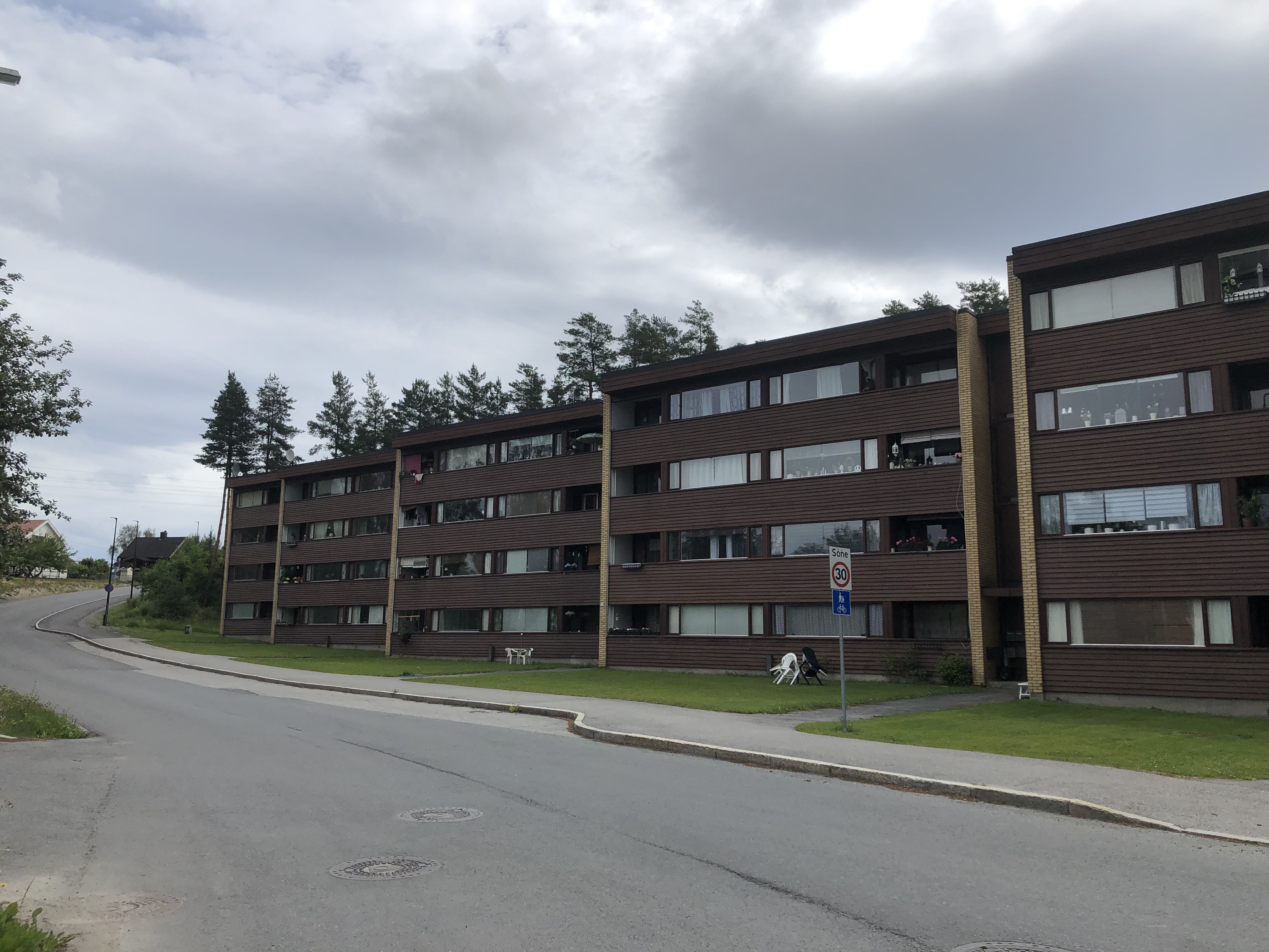 Arnegårdsveien i Hønefoss, nederst i veien, ved pendlerparkeringen.